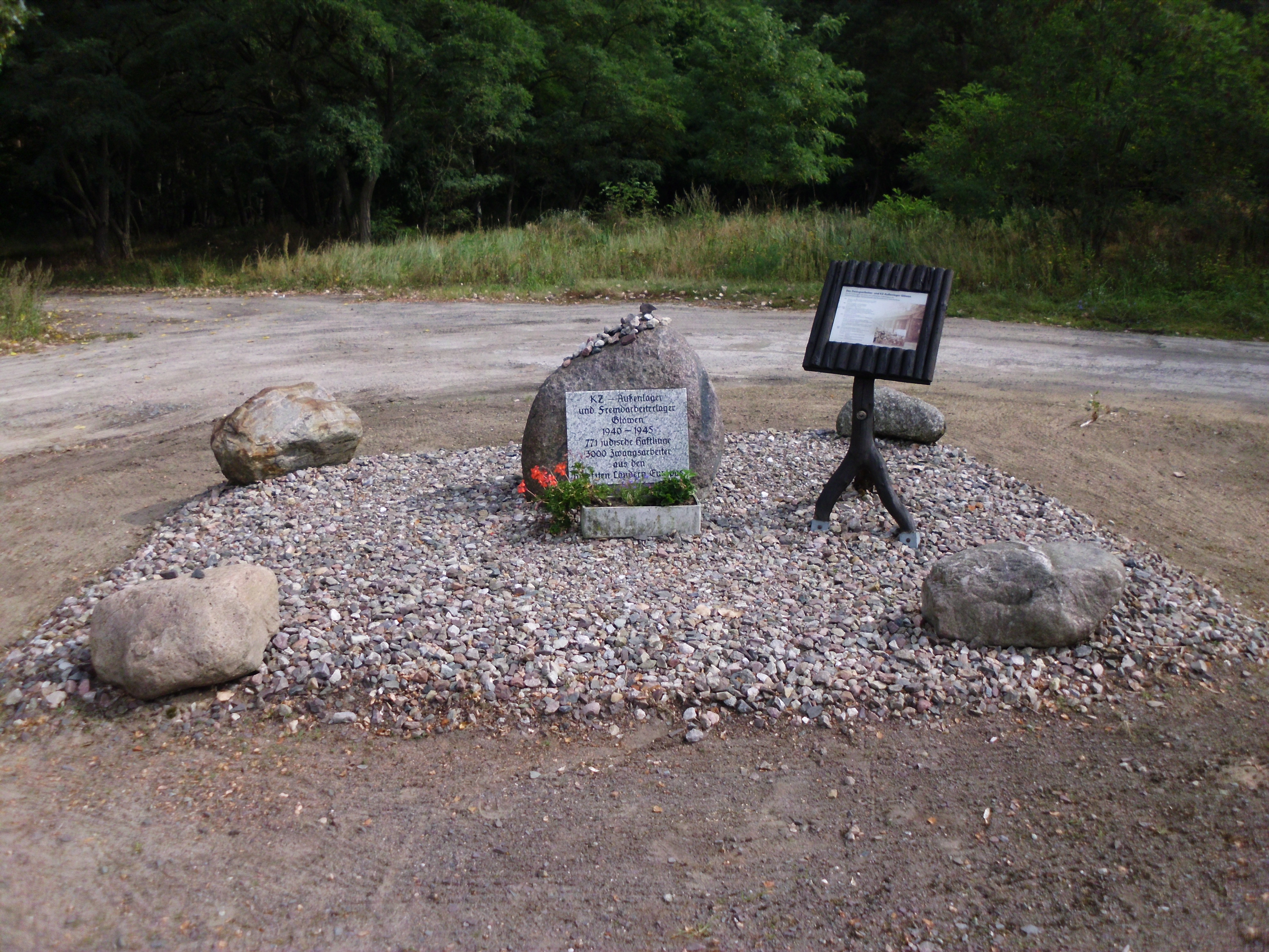 Gedenkstätte für die Opfer des KZ Außenlagers Glöwen an der Landstraße 10